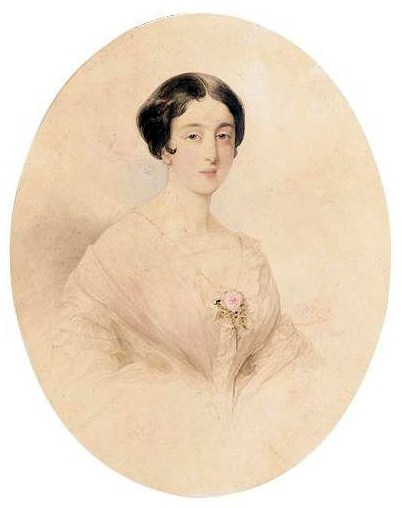 Графиня Анна Сергеевна Шереметева (урождённая Шереметева) (1811 - 1849), дочь С. В. Шереметева от брака с В. П. Алмазовой; фрейлина императрицы Александры Федоровны (с 1831 года). Первая жена (с 1837 года) графа Д. Н. Шереметева, дествительного тайного советника, камергера.